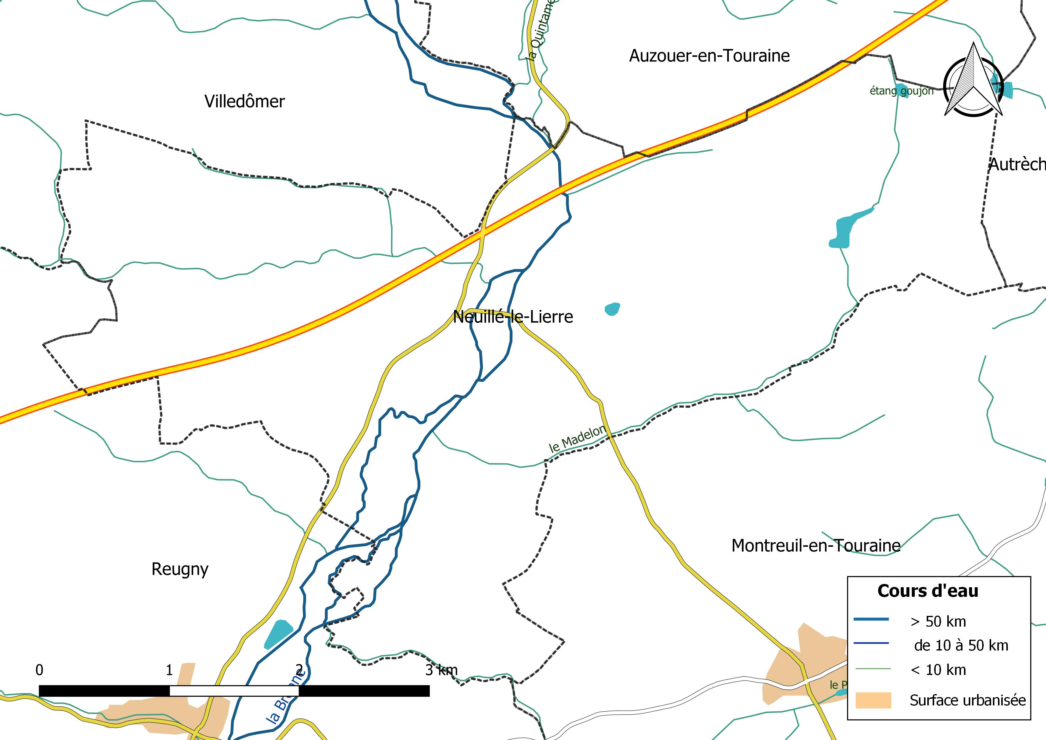 Carte du réseau hydrographique de la commune de Neuillé-le-Lierre (France).